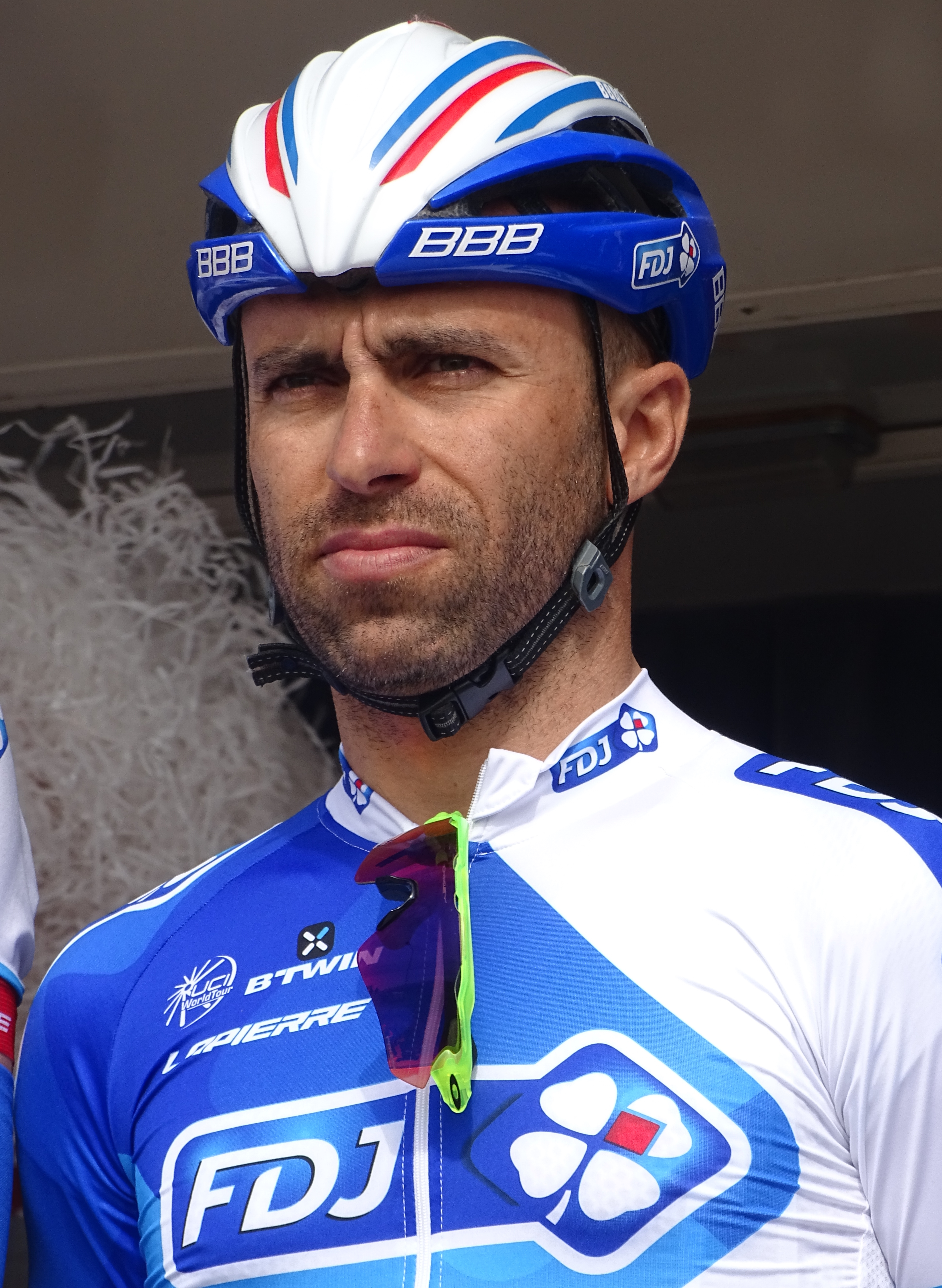 Reportage réalisé le jeudi 16 avril à l'occasion du départ et de l'arrivée du Grand Prix de Denain 2015 à Denain, Nord, Nord-Pas-de-Calais, France.